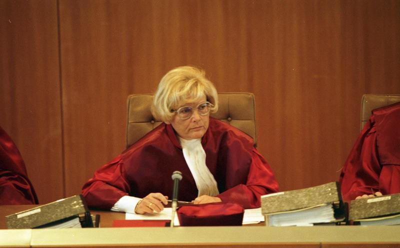 Am 17.1.1989 verhandelte der II. Senat des Bundesverfassungsgerichtes über die Verfassungsmäßigkeit des Bundeshaushaltsgesetzes für 1981. Damals hatte die SPD/FDP-Koalition die Kreditermächtigung für den Haushalt um 1,9 Millarden DM höher angesetzt als die für Investitionen vorgesehenen Ausgaben. da nach Meinung der damaligen Opposition, der CDU/CSU-Bundestagsfraktion, hiermit gegen Artikel 115 des Grundgesetzes verstoßen wurde, hatten 231 Abgeordete der CDU/CSU-Fraktion am 6.9.1982 den Antrag beim Bundesverfassungsgericht gestellt, die Bestimmung über die damalige Kreditermächtigung für verfassungwidrig zu erklären. Artikel 115 verpflichtet, die Verschuldung unterhalb der für Investitionen vorgesehenen Ausgaben zu halten. Die Entscheidung in diesem "Abstrakten Normenkontrollverfahren" soll am 18. April 1989 verkündet werden.